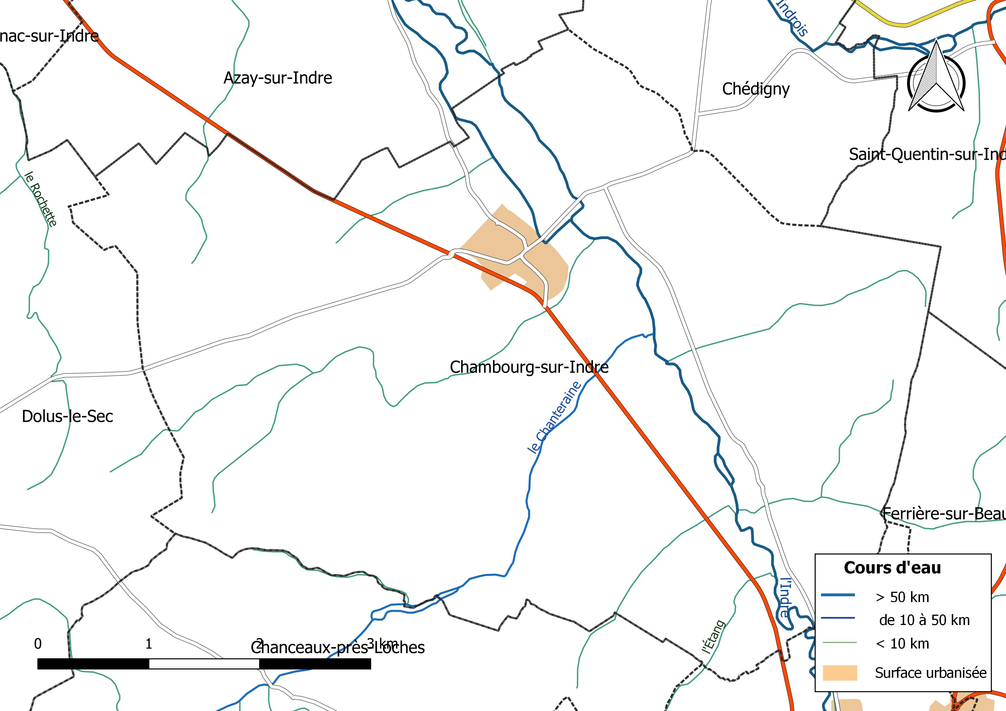 Carte du réseau hydrographique de la commune de Chambourg-sur-Indre (France).